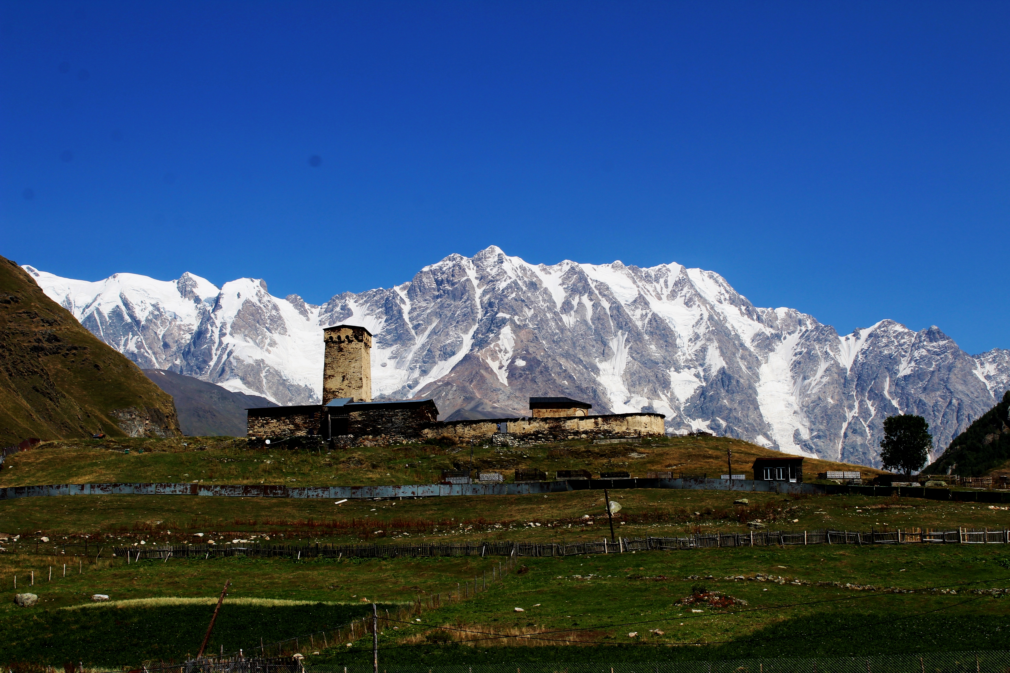 It's the most beautiful place to see.